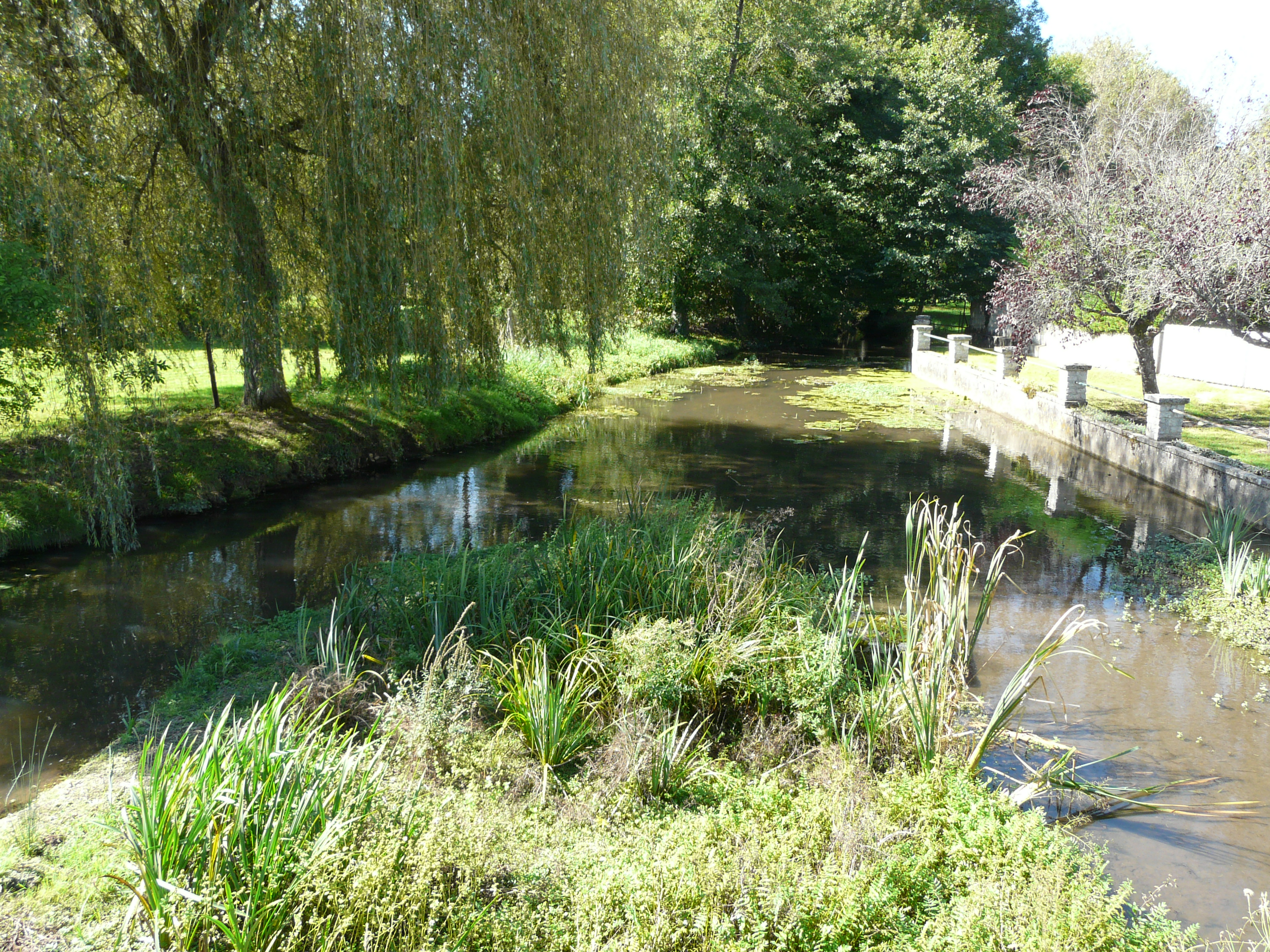 Ruisseau la Belle à Vieux-Mareuil, Dordogne, France. Vue prise en direction de l'aval.